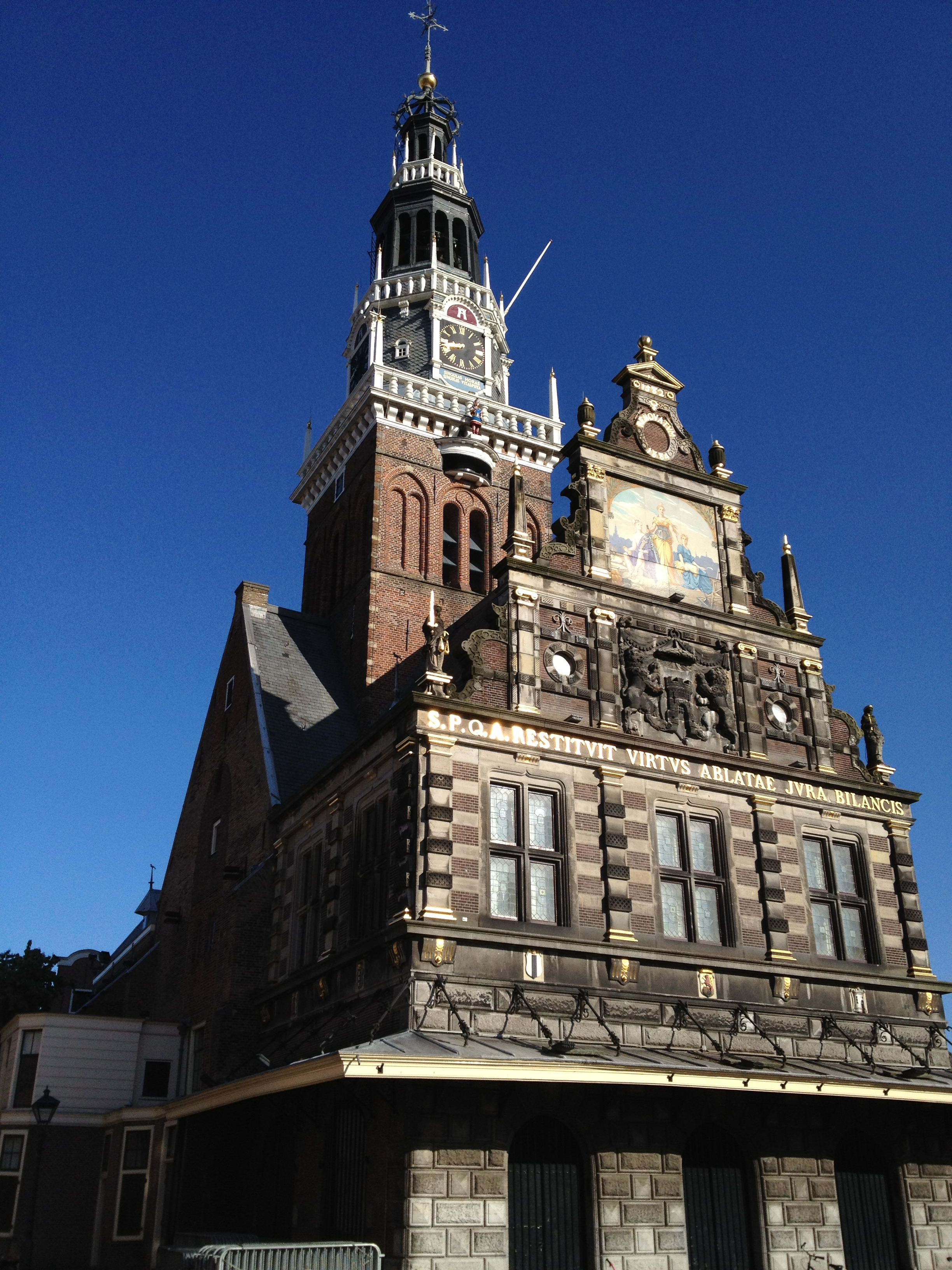 De waag in de ochtendzon